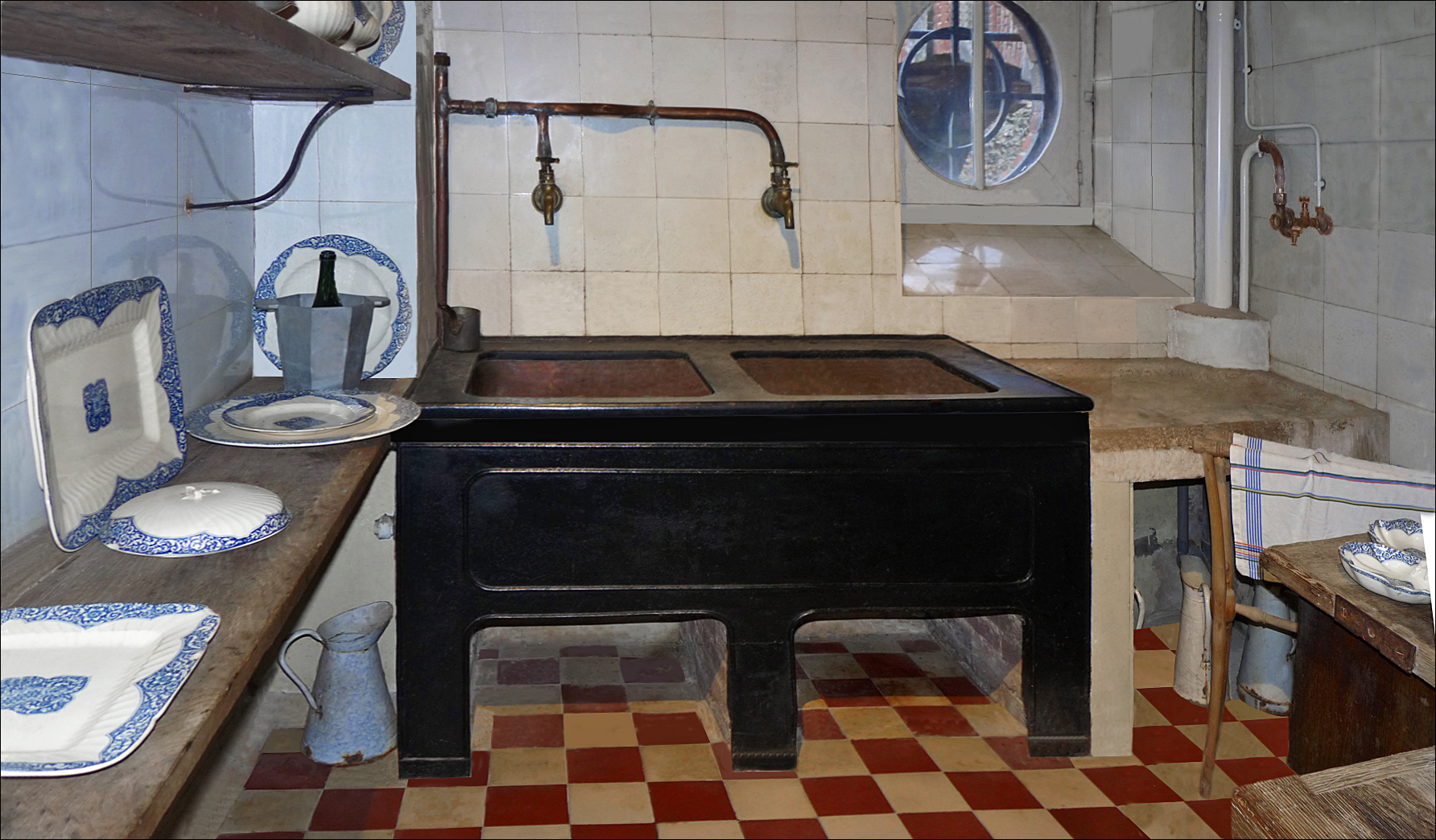 Château de Breteuil. La plonge pour le lavage de la vaisselle. Arrivée de gaz à droite.